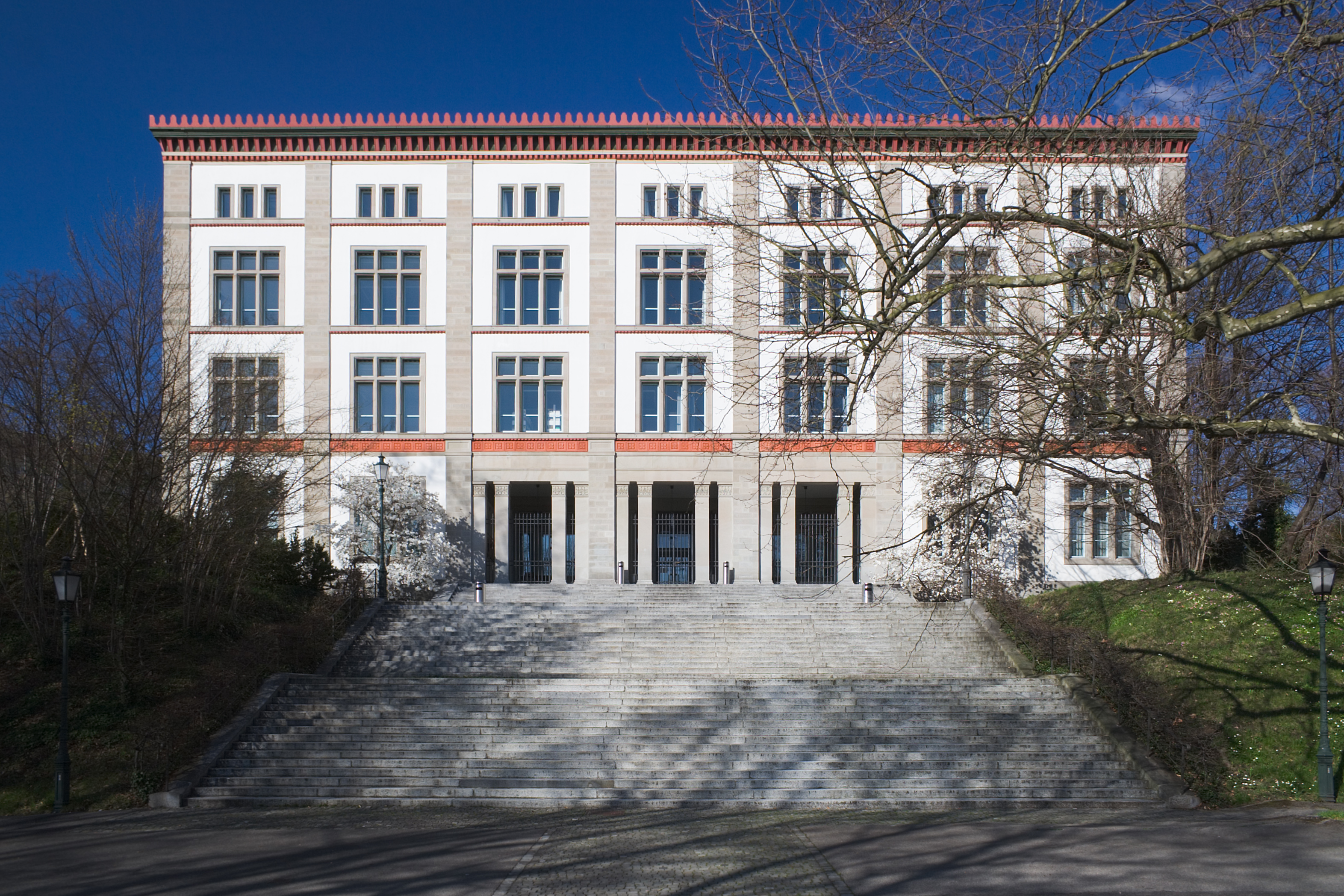 Kantonsschule von Gustav Albert Wegmann in Zürich, Schweiz